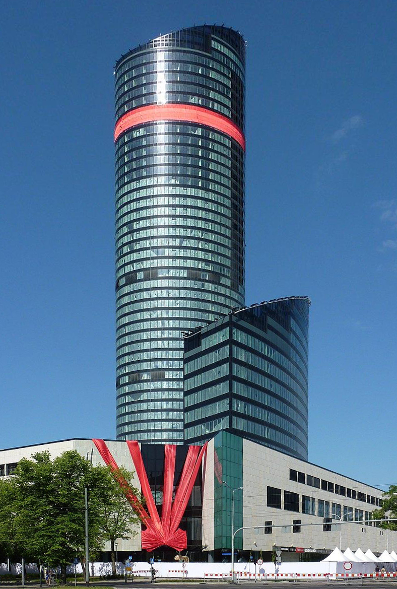 Jutro otwarcie. Gigantyczna czerwona kokarda pod przepasaną wstążką wieżą... czy to przykład dobrego smaku, czy bezguścia? To tak a propos innej (trwającej równolegle pod innym zdjęciem - - bodaj od wczoraj) dyskusji na temat co się komu podoba... ;-)